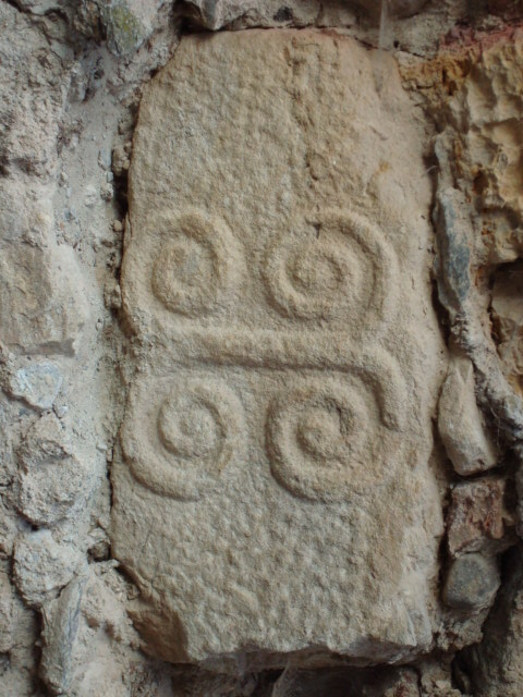 Pietra con incisa la doppia spirale